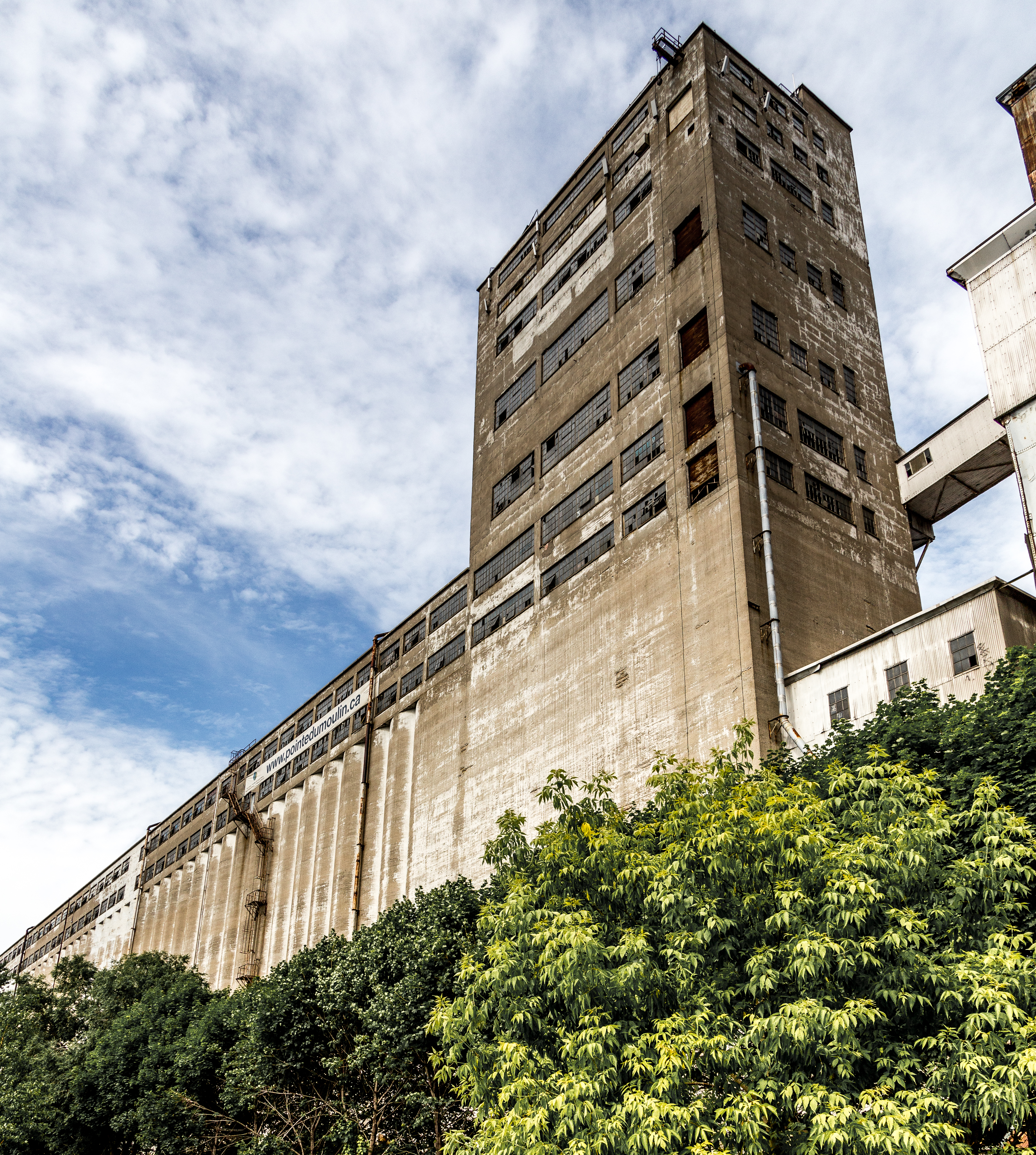 Élévateur 5 B1, Vieux-Port de Montréal, (Canada). (Protection ÉFP reconnu. Voir la liste des lieux patrimoniaux de Montréal pour plus de détails).